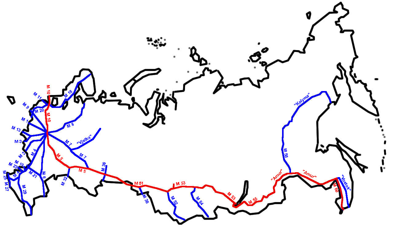 M10, M5, M51, M53, M55, M58 "Amur", M60